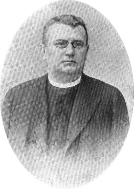 František Blahovec (1864 - 1942), Český římskokatolický kněz.